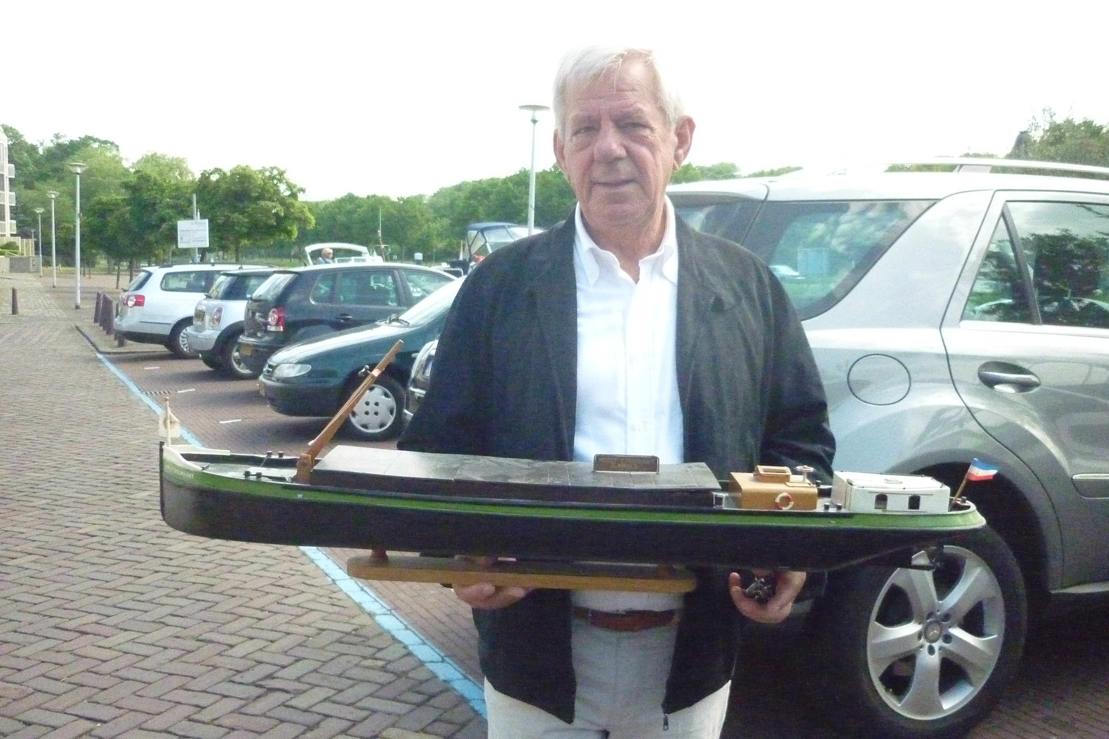 Anton Koole met een model van de Nooit Volmaakt